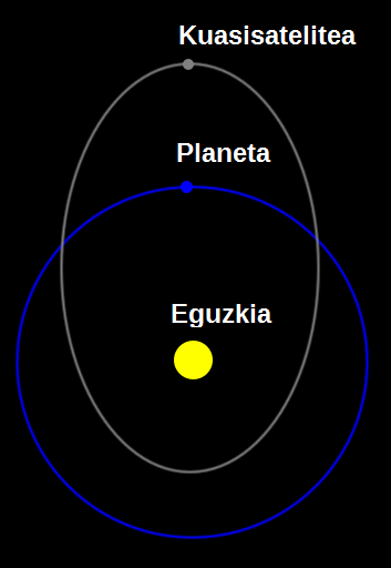 Kuasisatelite baten azalpen-irudia, terminoa ulertzeko egokia.